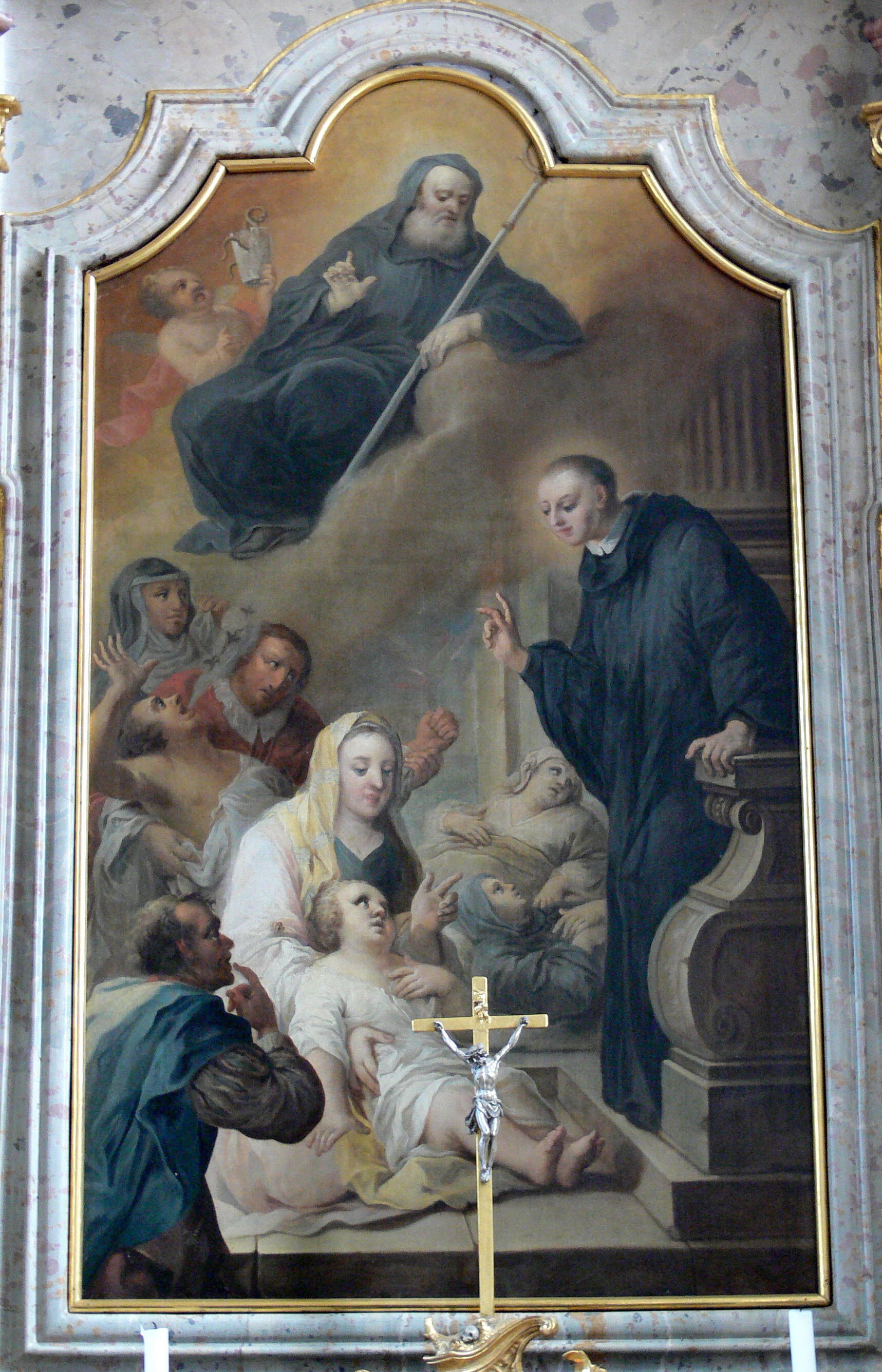 Pfarrkirche St. Ulrich, St. Ulrich im Schwarzwald, Gemeinde Bollschweil Ulrichsaltar (Schreiner: Fr. Moosbrugger aus Bregenz, Fassmaler: A. Kummer aus Wurzach), 1748-1750; Altarblatt: Der hl. Ulrich von Zell als Helfer und Wundertäter mit dem hl. Benedikt, 1772 von Simon Göser